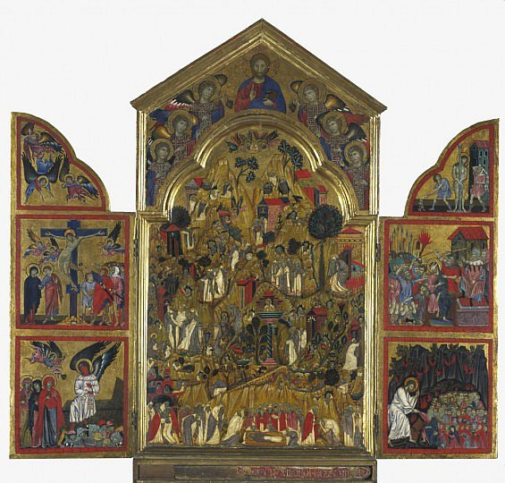 Maestro di San Gaggio Trittico - al centro scene dalla vita dei santi della Tebaide ai lati scene della Passione di Cristo Olio su tavola - aperto: 118.50 x 124.50 cm centro: 112.00 x 62.00; parte sinistra: 87.40 x 30.90 cm; parte destra: 87.80 x 31.00 cm; Chiuso: 118.80 x 65.70 x 7.60 cm National gallery of Scotland - Edimburgo